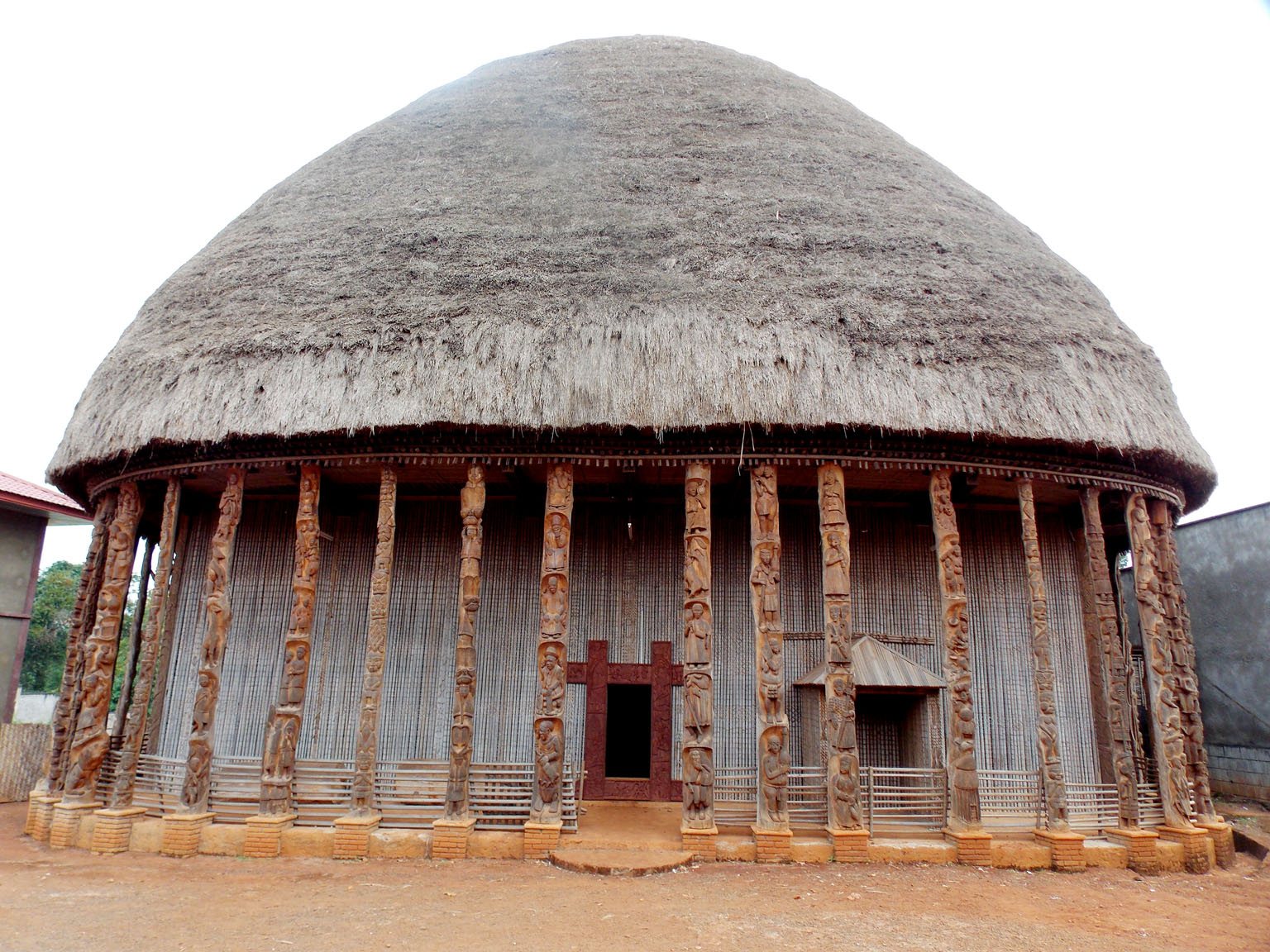 (Die sheng) le symbole supreme et representatif de la chefferie et du peuple Bandjoun